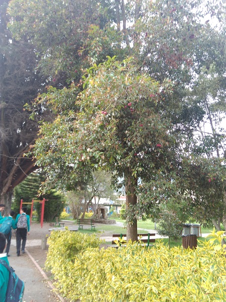 Arbol de syzygium paniculatum